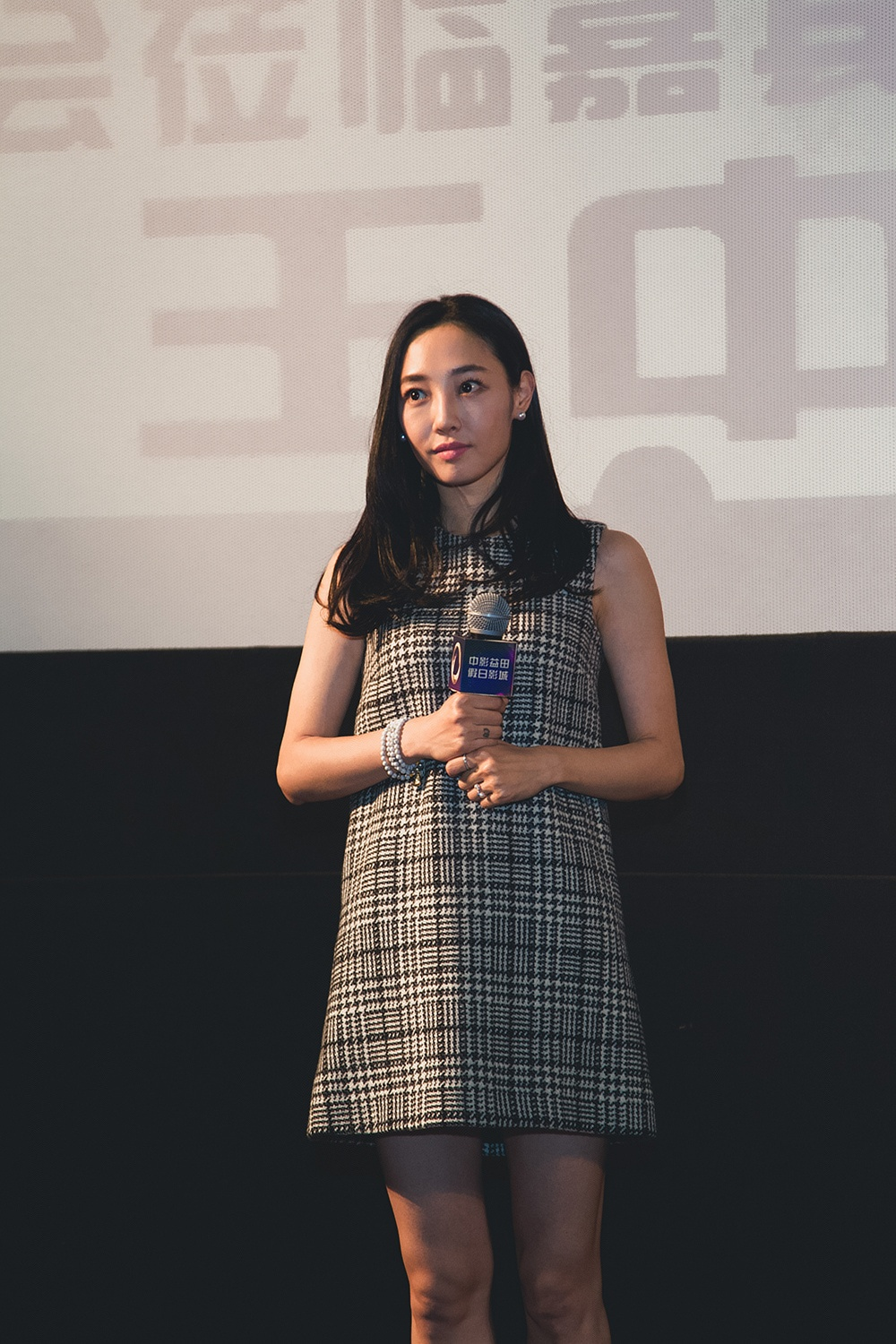 电影- 私人订制 电影见面会。@白百何 的一张新闻稿件 其他就不了，由官方去处理了。